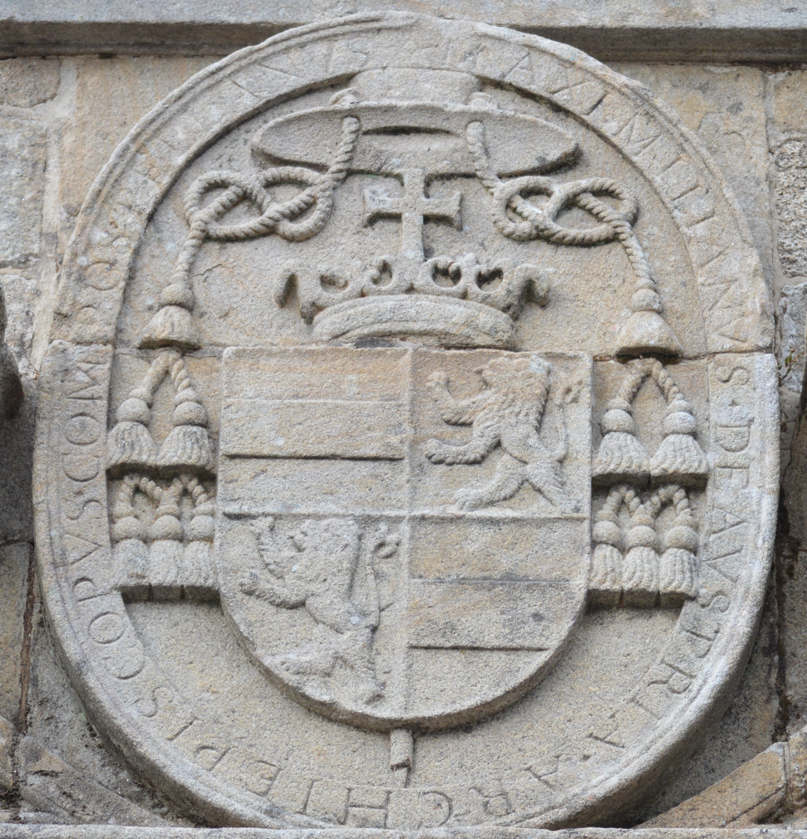 Escudo heráldico del Arzobispo Maximiliano de Austria, en la escalinata de la puerta principal de la catedral de Santiago de Compostela.